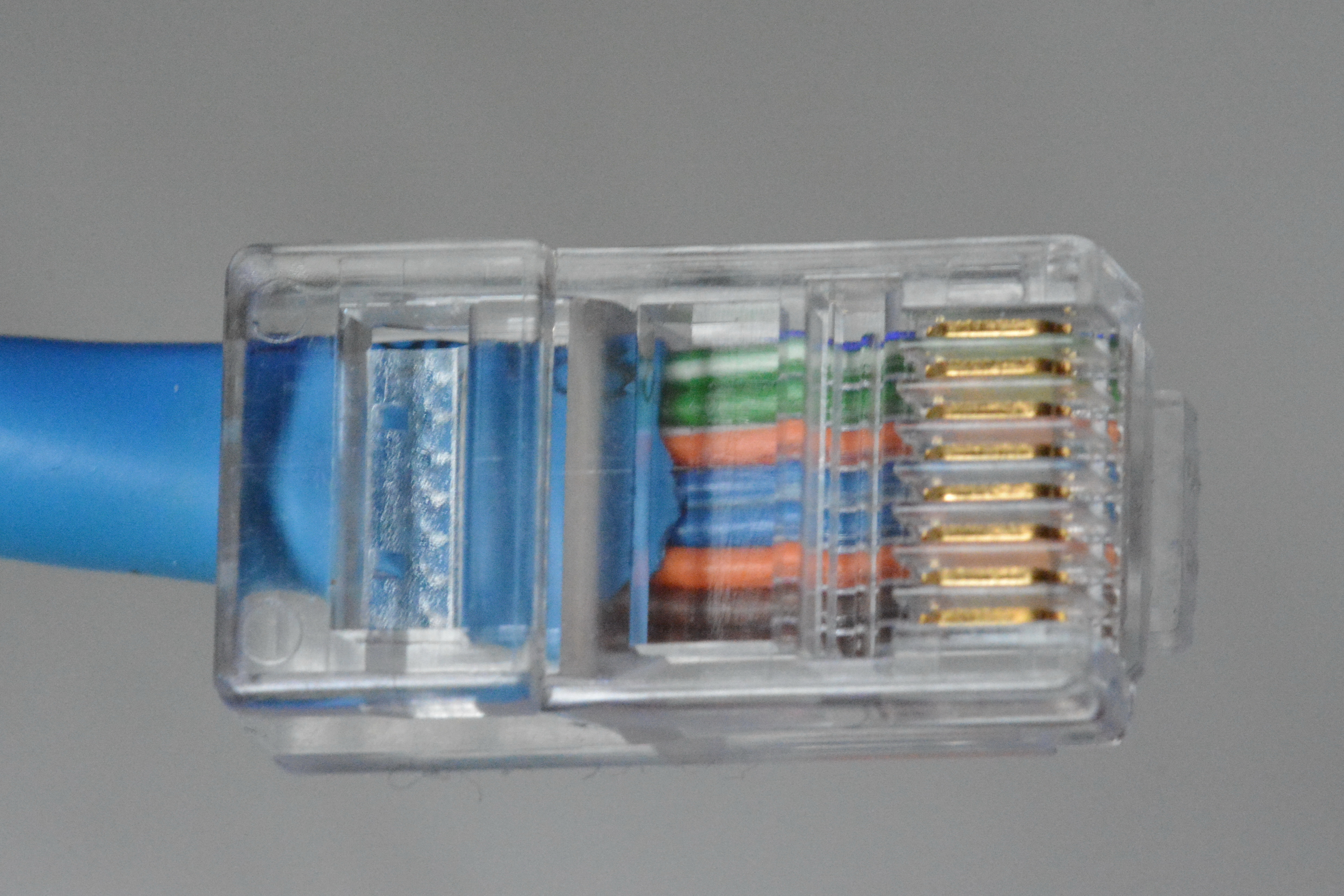 European Patchcable